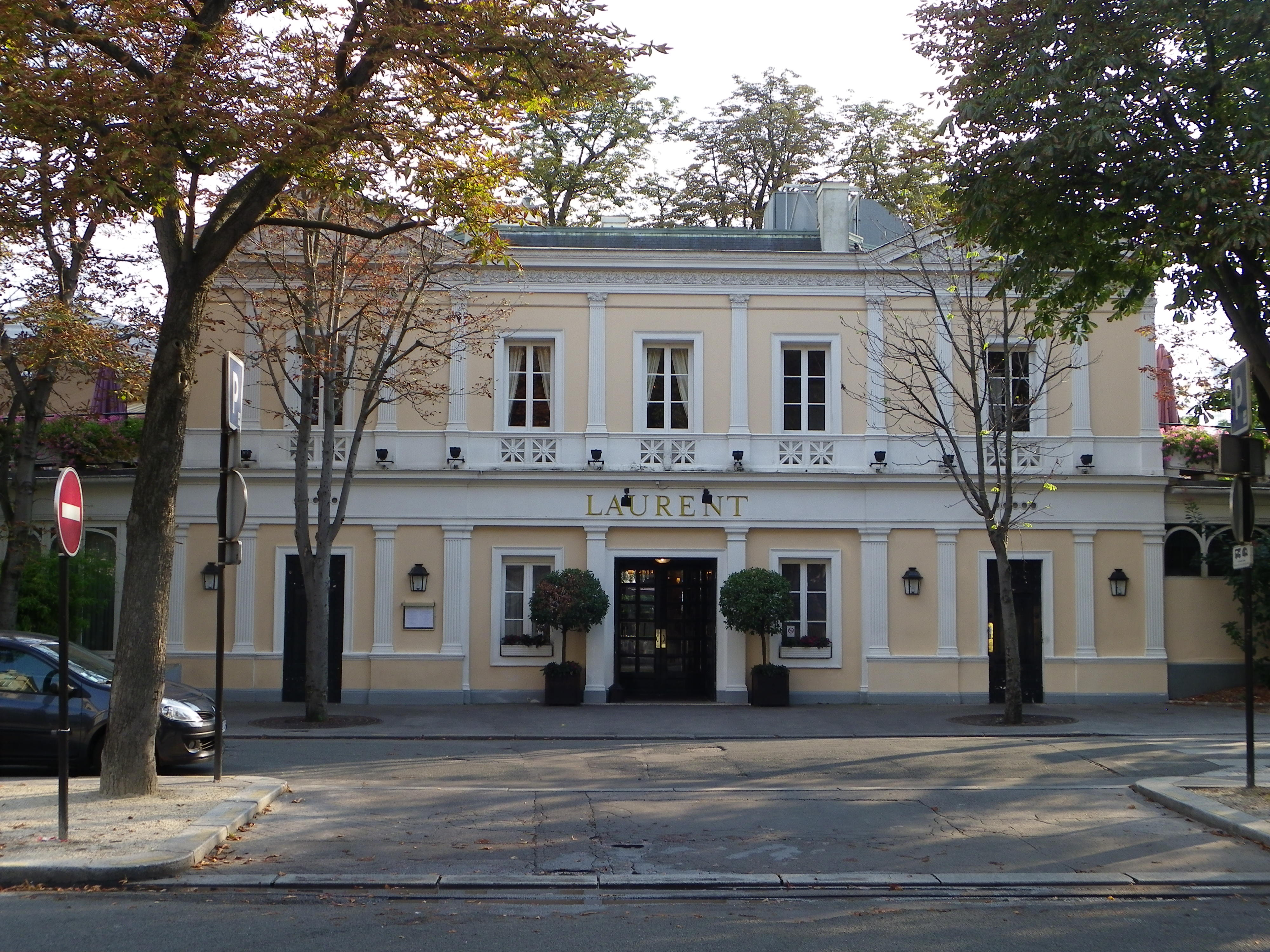 Restaurant Laurent, Carré Marigny des Jardins des Champs-Elysées, 41 Avenue Gabriel, VIIIe arrondissement, Paris, France.